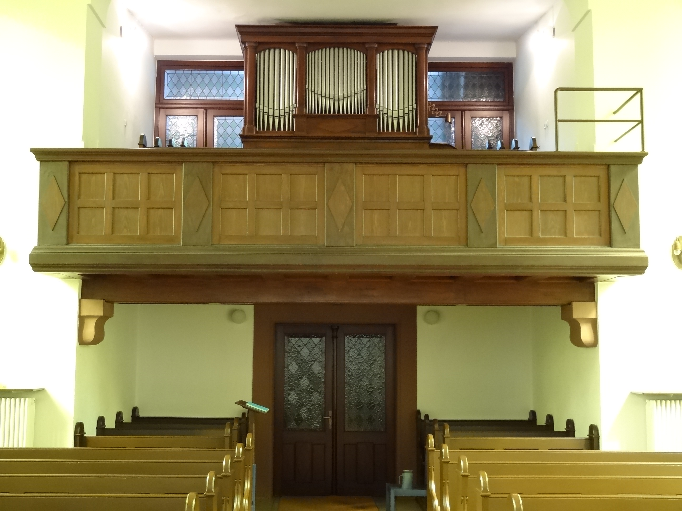 Kapelle in den VITOS-Kliniken für Psychiatrie